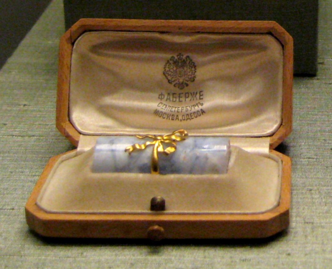 Печать с монограммой МС. Принадлежала актрисе Марии Гавриловне Савиной (1854-1915). Фирма К. Фаберже, 1904-8, мастер Э. Коллин. Халцедон, золото. Эрмитаж